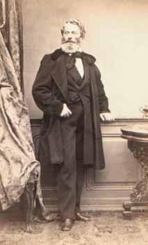 Carol Popp de Szathmary - Constantin Lecca, deţinător Biblioteca Academiei Române, Bucureşti.